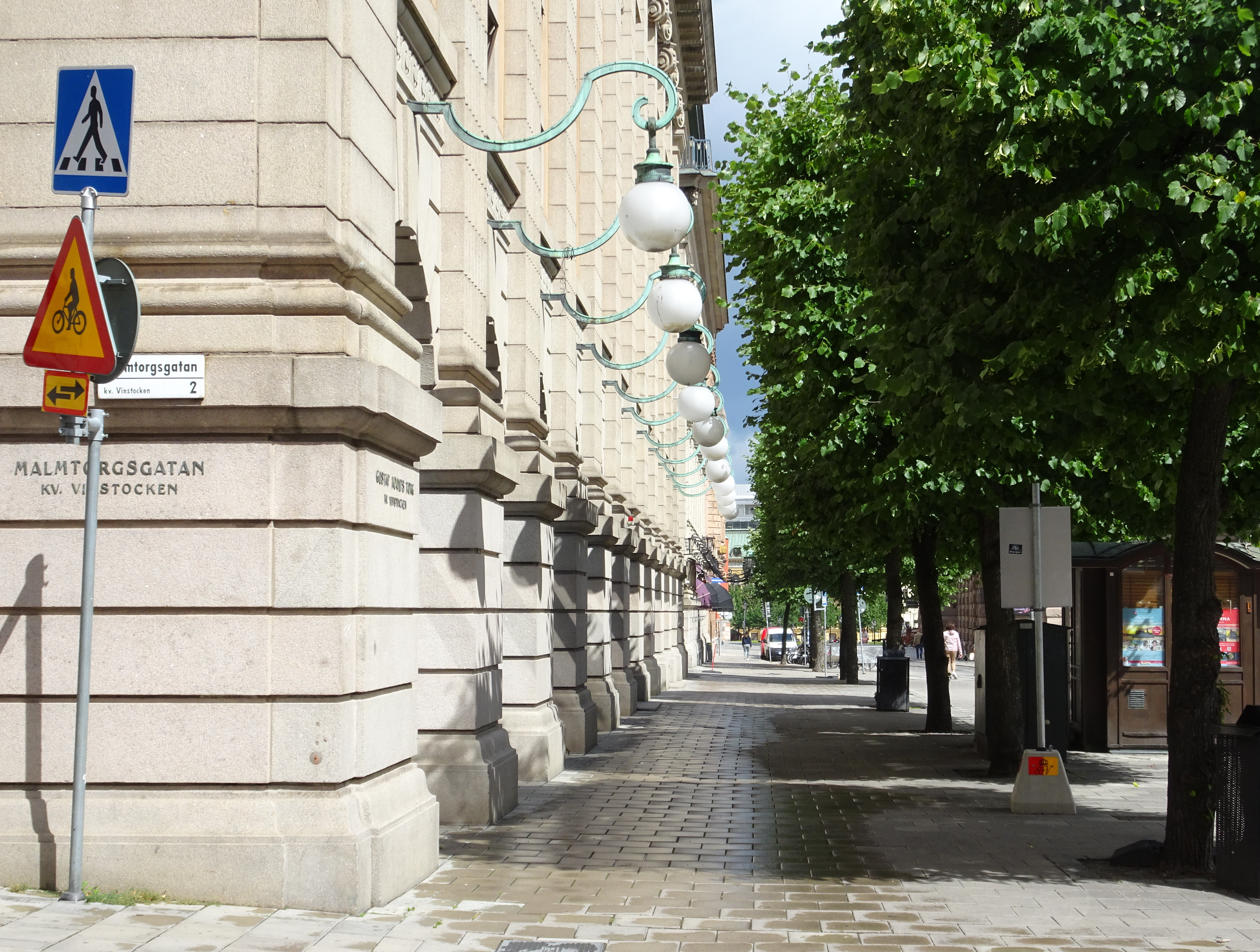 Kvarteret Vinstocken (f.d. Skandinaviska Bankens palats) fasad mot Gustaf Adolfs torg